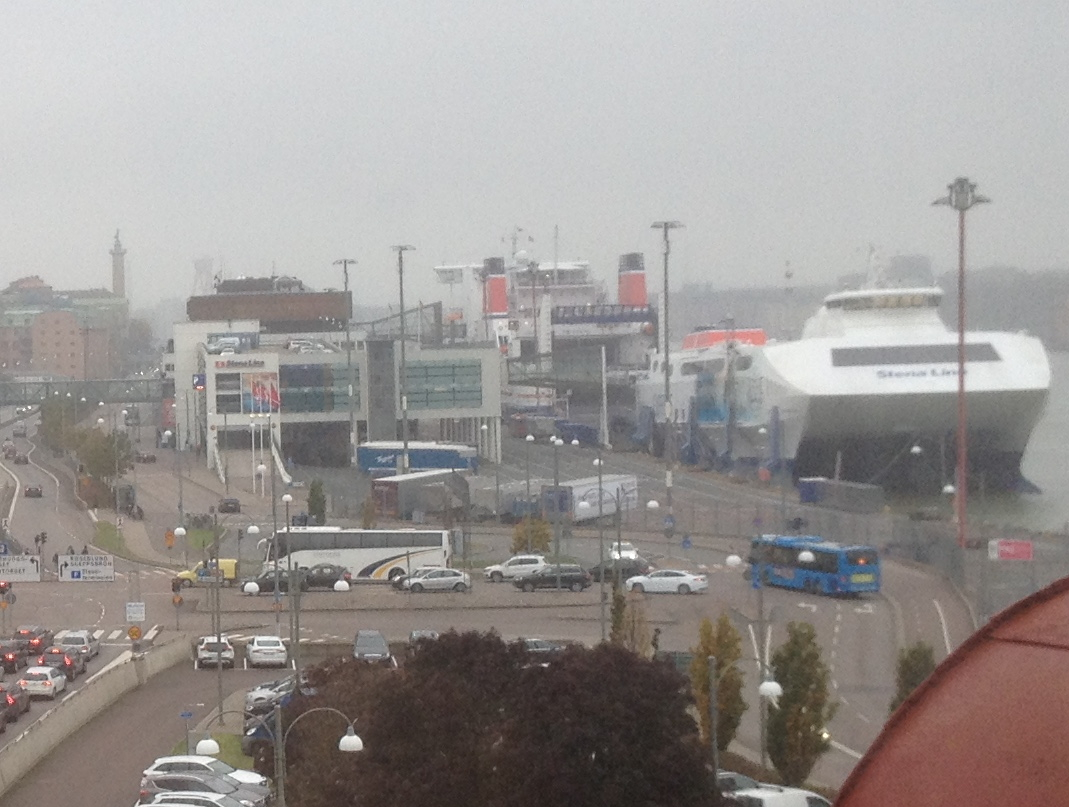 Masthuggsterminalen – Stena Lines färjeterminal mot Danmark.